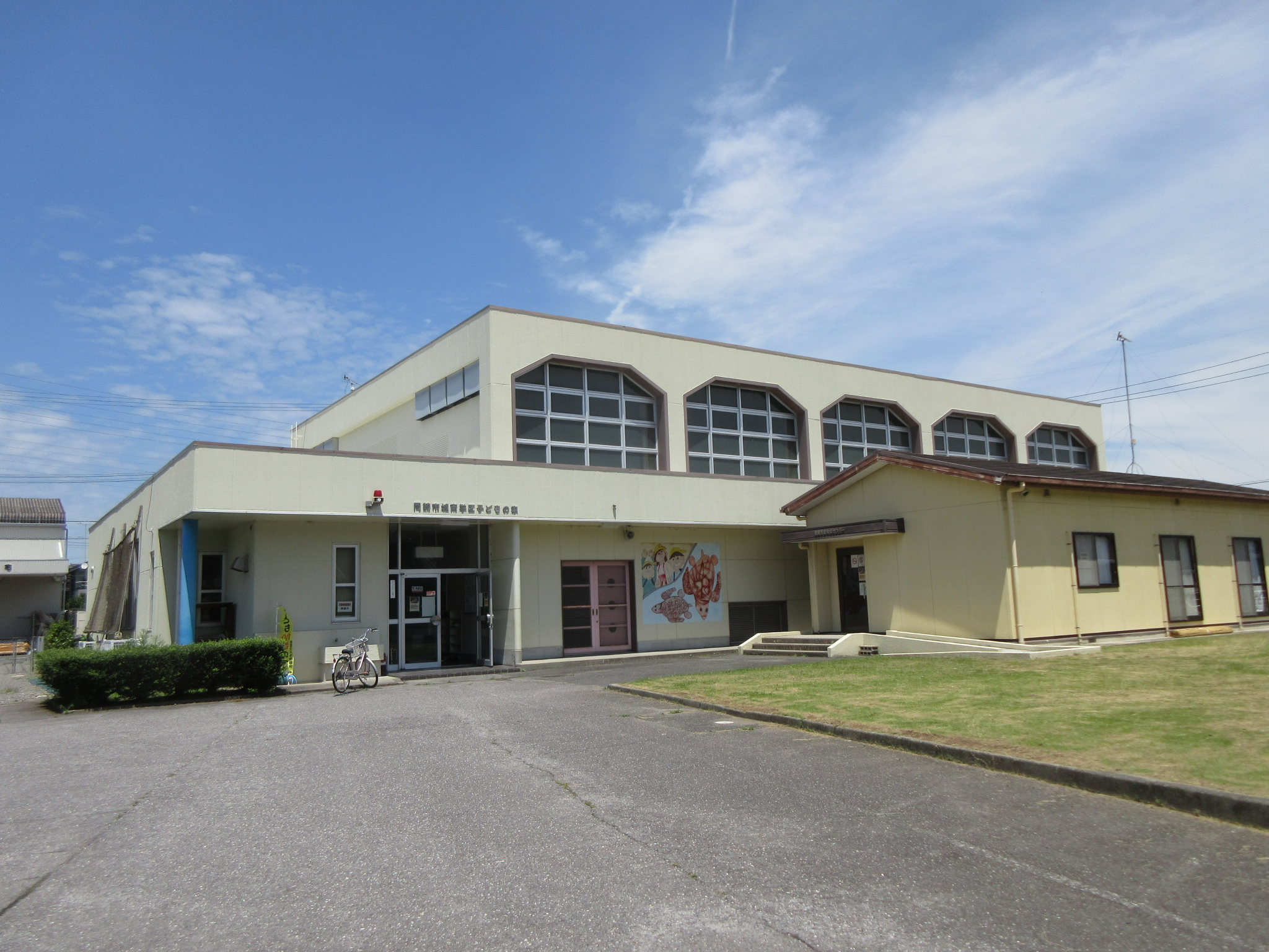 岡崎市城南学区こどもの家